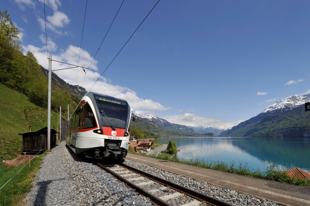 SPATZ als REGIO auf der Strecke Meiringen - Interlaken Ost vor dem Brienzersee